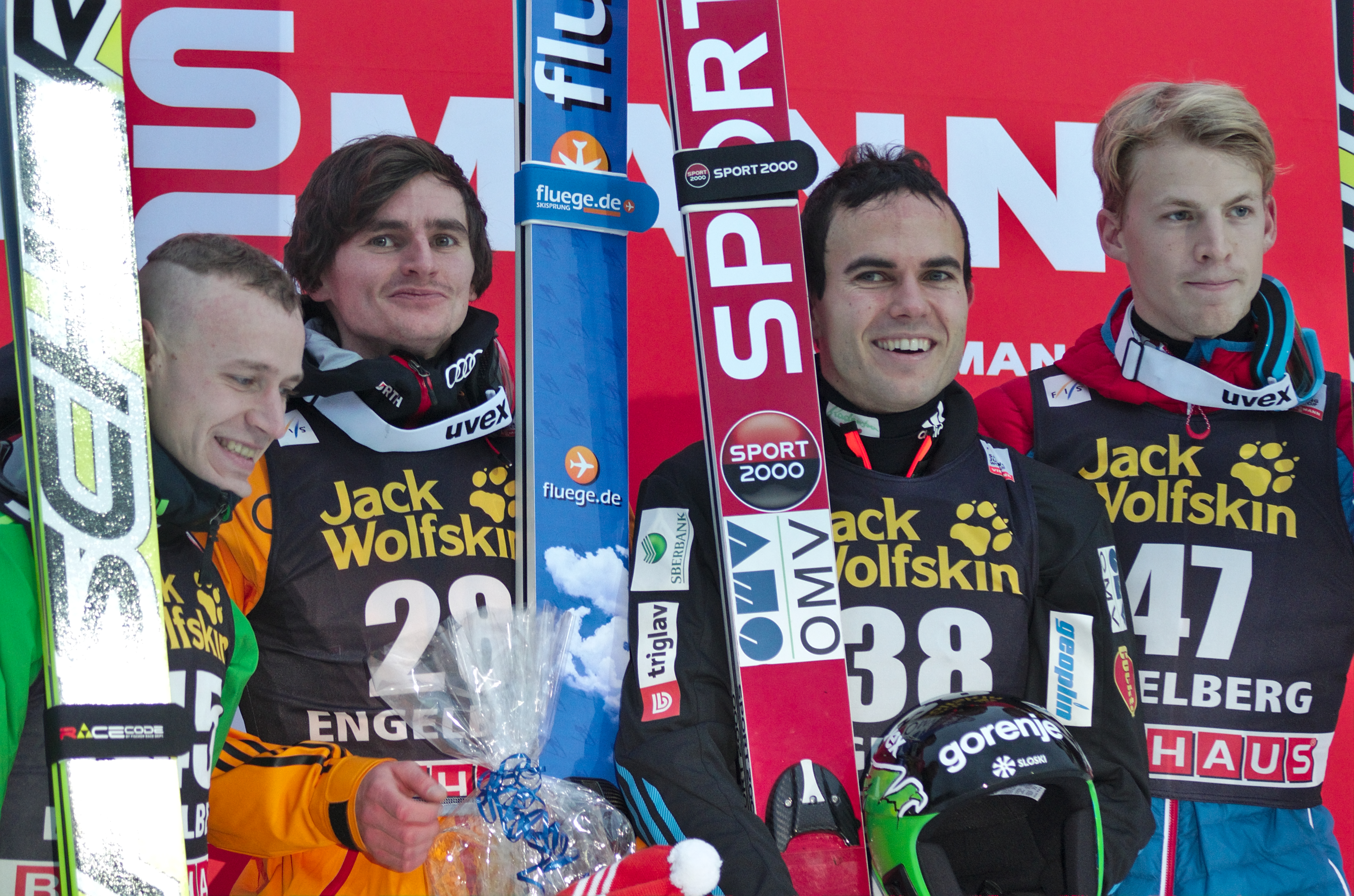 FIS Ski Jumping World Cup 2014 - Engelberg - 20141220 - Koudelka, Freitag, Damjan et Hayboeck